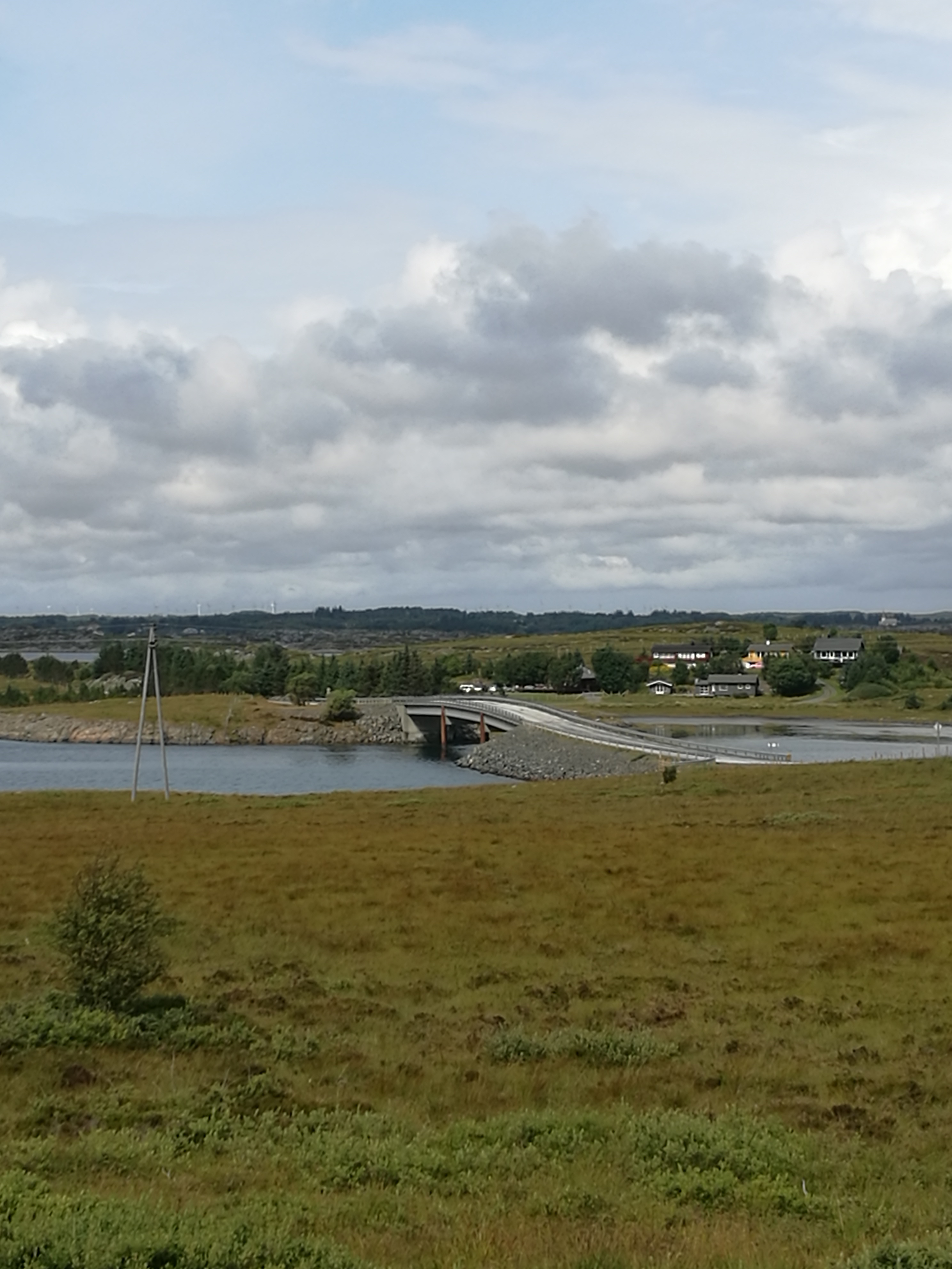 Hestøysundet bru (70 meter) på Smøla mellom Kuli og Hestøya, Fylkesvei 669.